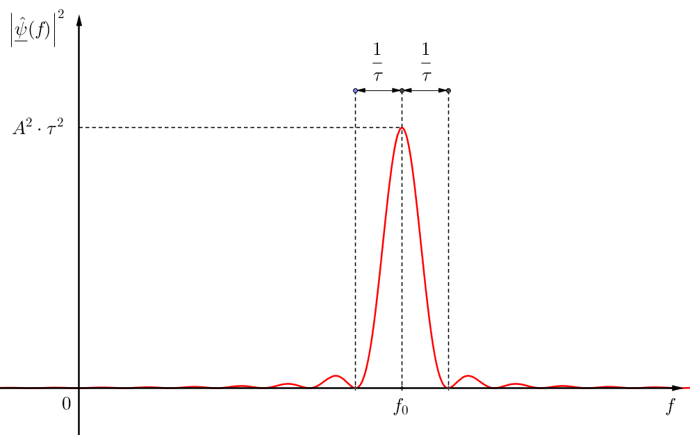 Répartition spectrale de l'énergie d'un signal sinusoïdal d'amplitue A et d'une durée \tau